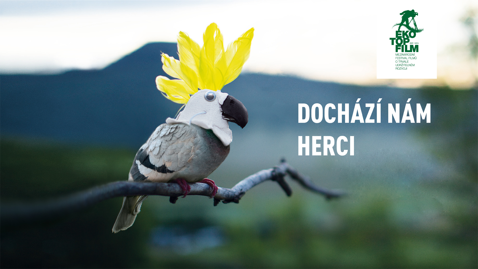 Znělka festivalu 2016